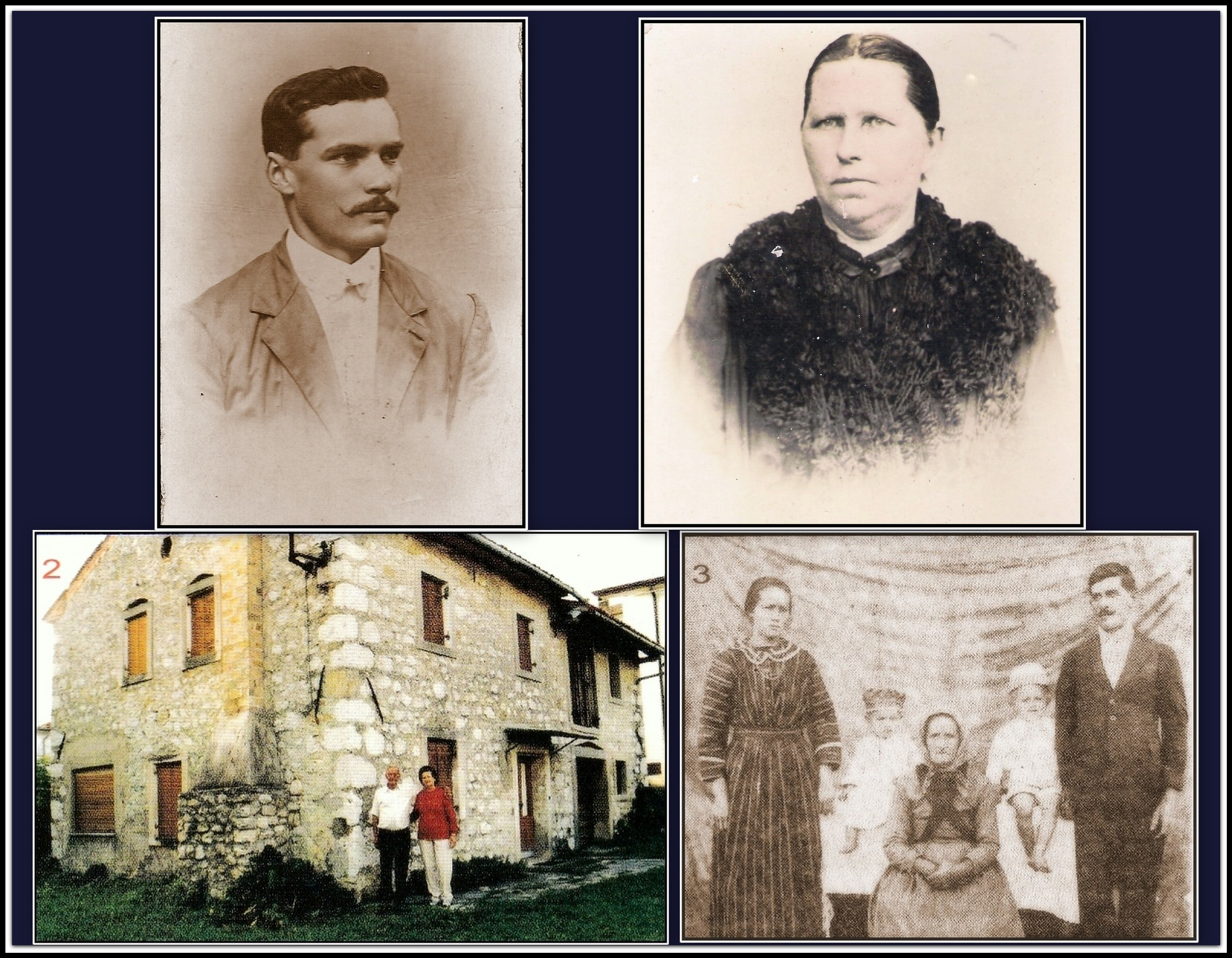 Colagem mostrando o casal de imigrantes italianos João Batista Uliano e Maria Casagrande Uliano, idealizadores e com a colaboração de outros, construtores da capela de Santa Augusta, em 1887, em Braço do Norte-SC. Aparece a casa do casal na Itália.